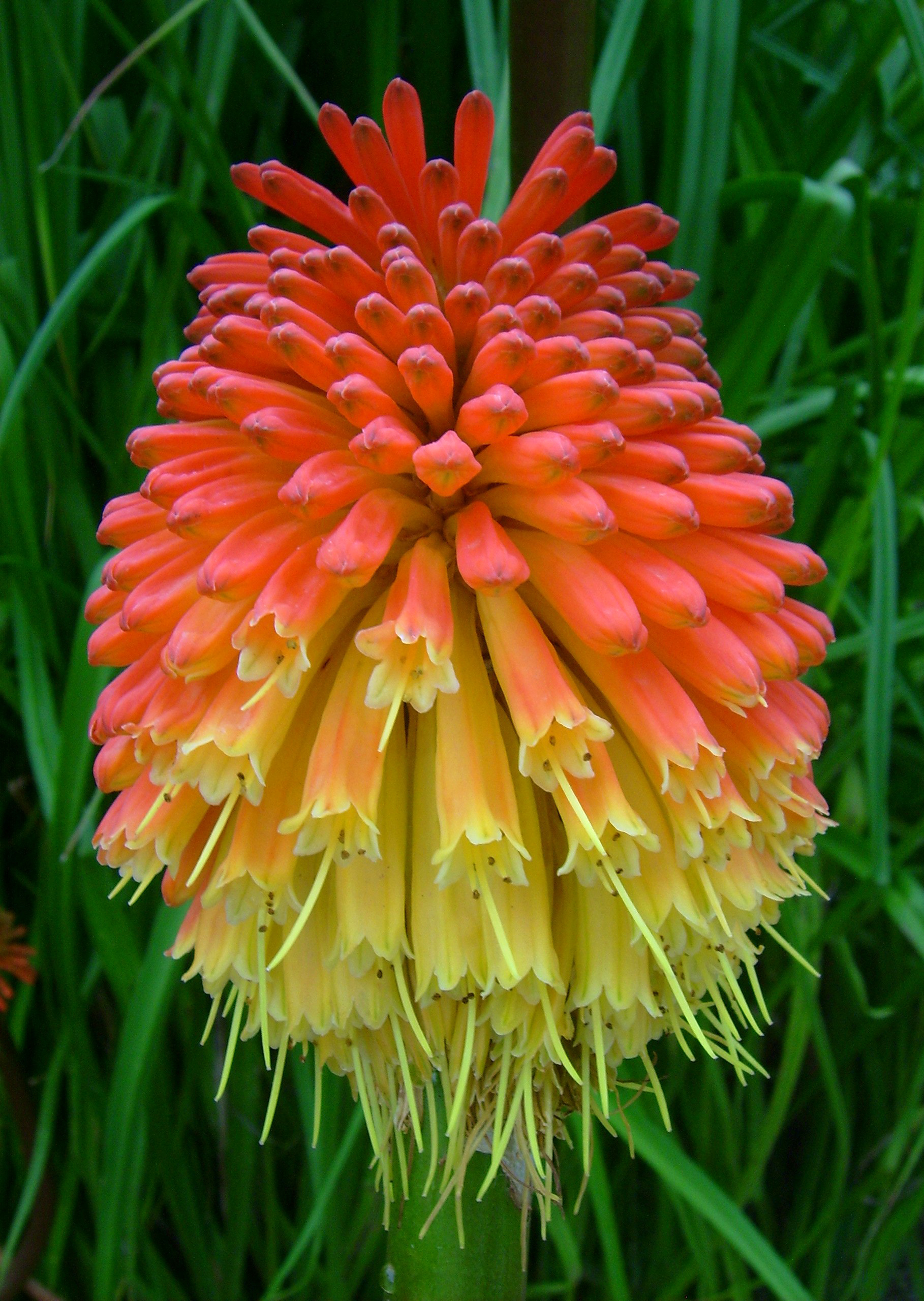 Kniphofia uvaria, Asphodelaceae, En Jardí Botanic Marimurtra (Blanes)